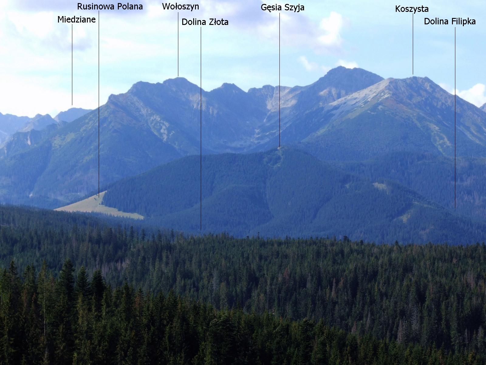 Widok z Głodówki na Tatry (fragment widoku)